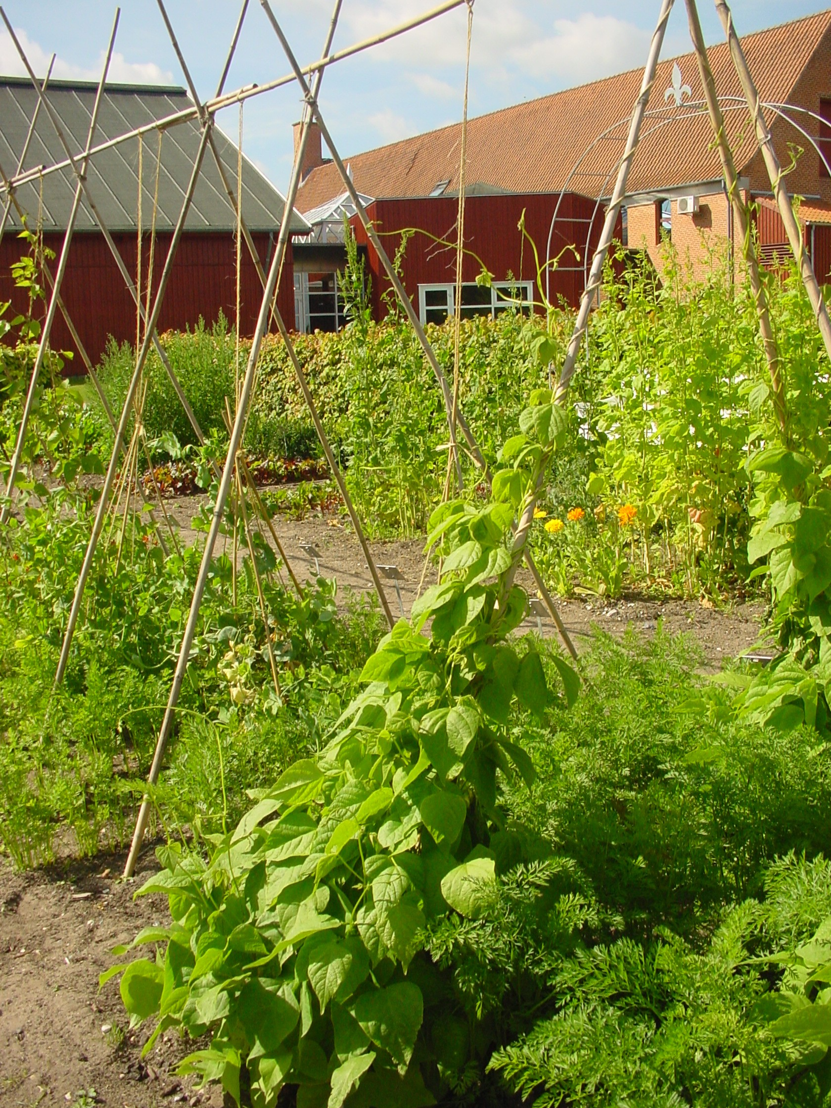 Bønner hos Dansk Landbrugsmuseum